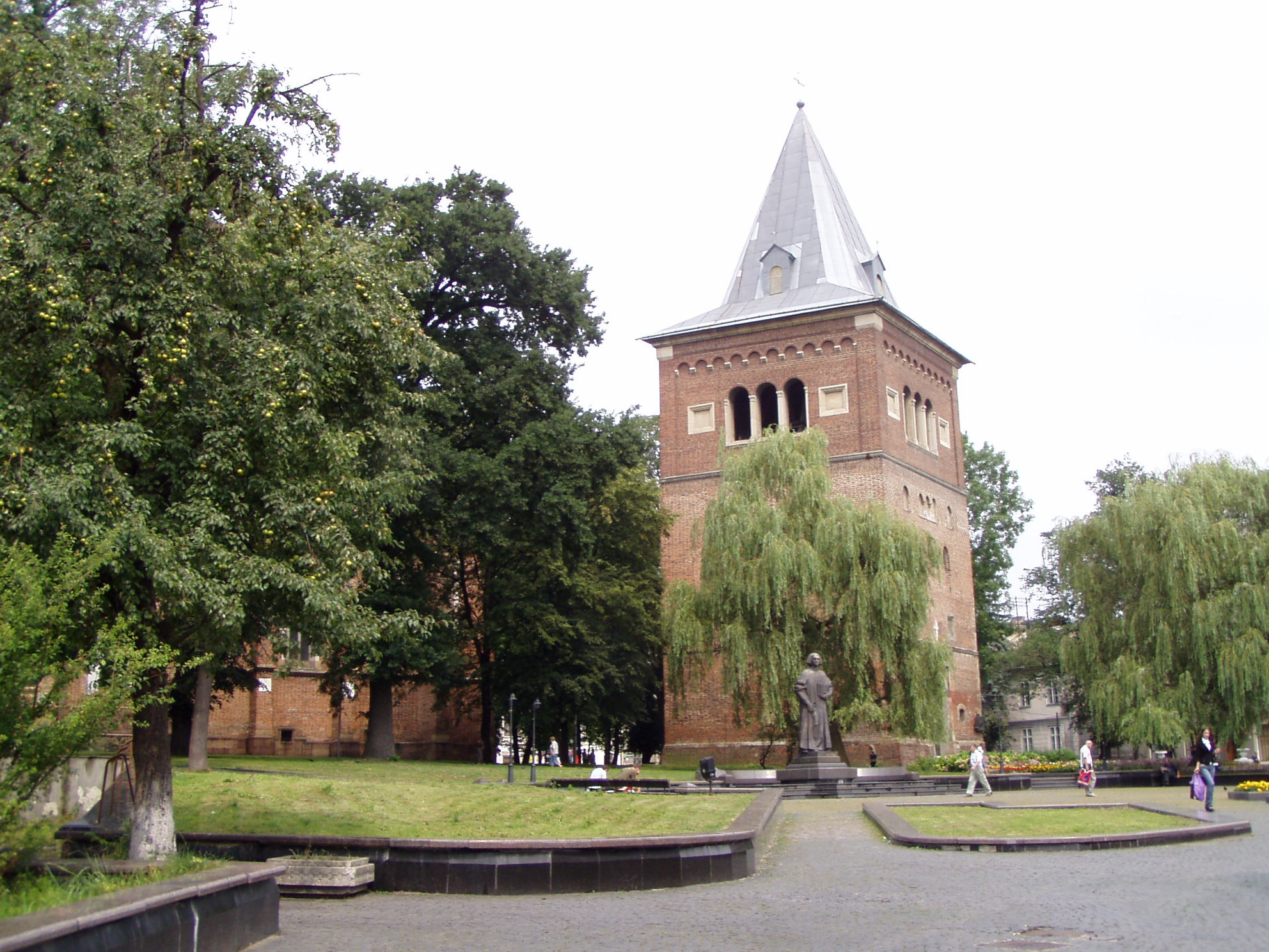 Pomnik Jurija Drohobycza.